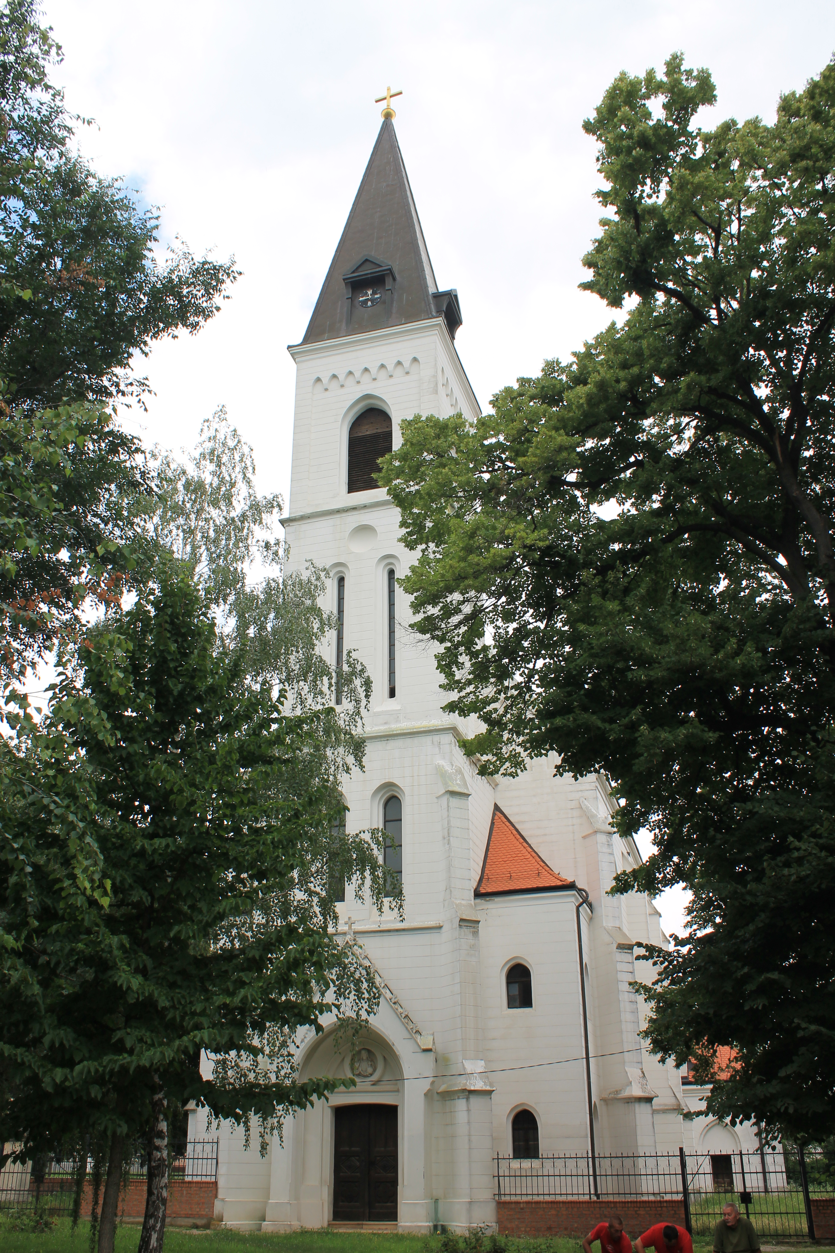 Rimokatolička crkva Sv. Mihajla (Erdevik)